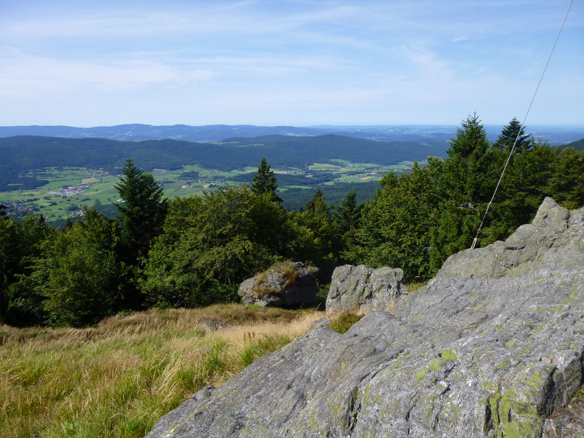 Blick vom 1080 m hohen Mühlriegel nach Süden; Berggipfel auf der Wanderroute vom Kaitersberg zum Großen Arber-Gipfel